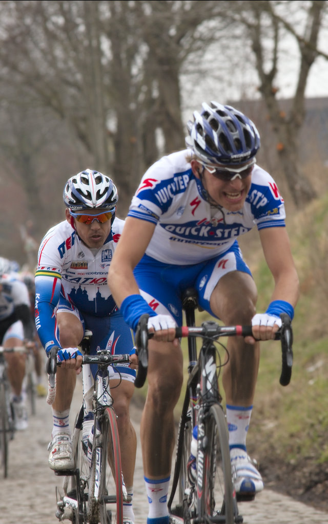 Wouter Weylandt leading before Robbie McEwen, Omloop Het Nieuwsblad 2009